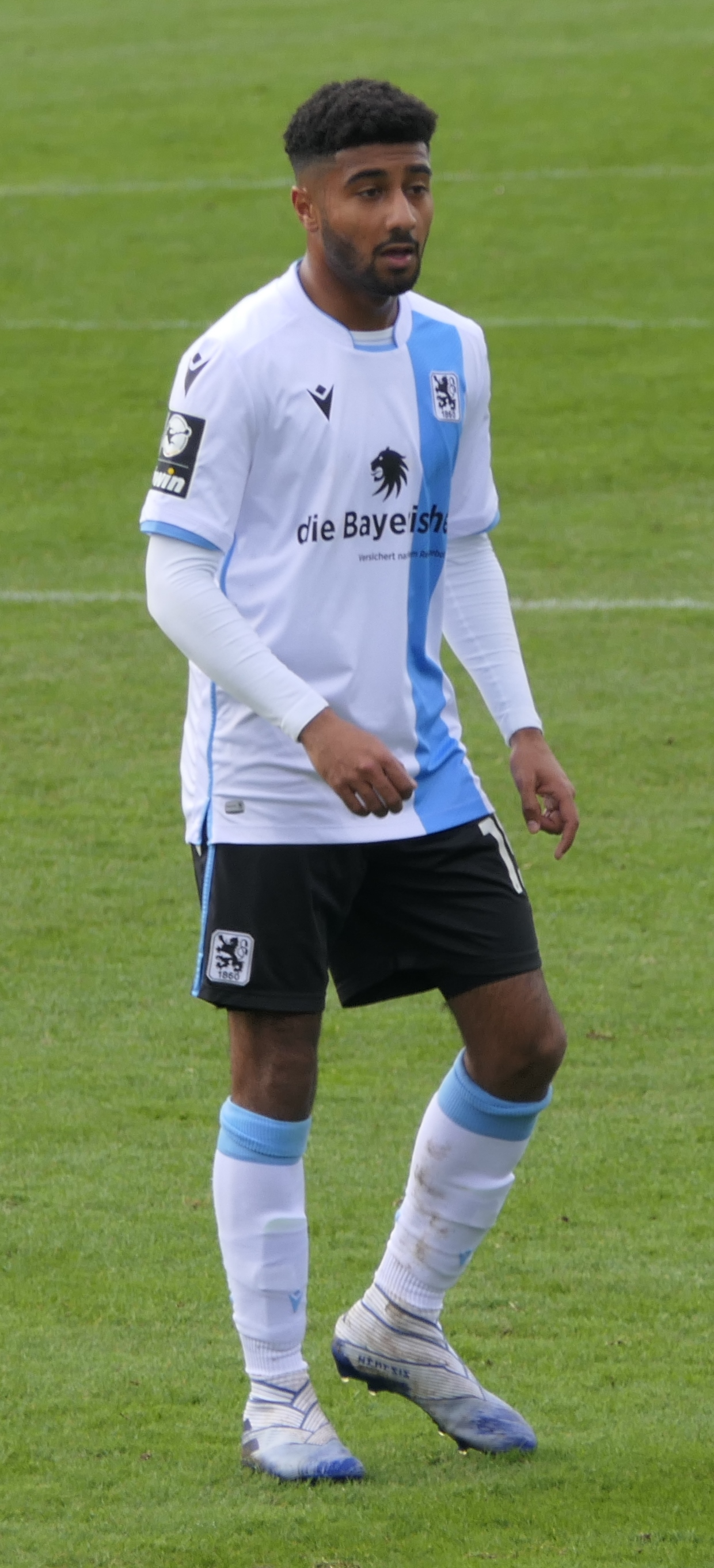 Der Fussballprofi Noel Niemann im Trikot vom TSV 1860 München beim Heimspiel gegen Eintracht Braunschweig am 26.01.2020.